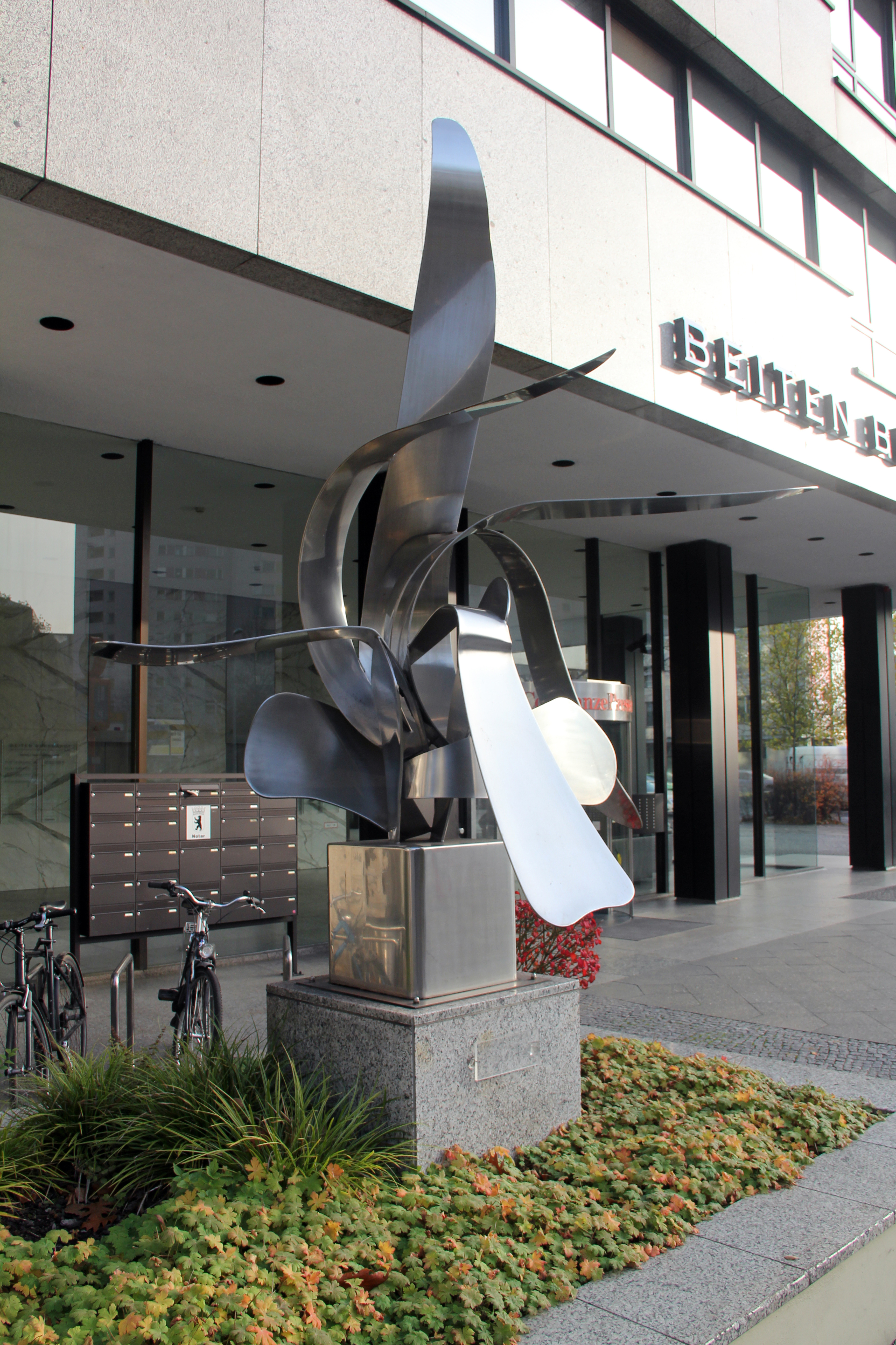 Skulptur, "Der Wuchs der Flammen" von Eila Hiltunen, 1981, Kurfürstenstraße 72, Berlin-Tiergarten, Deutschland